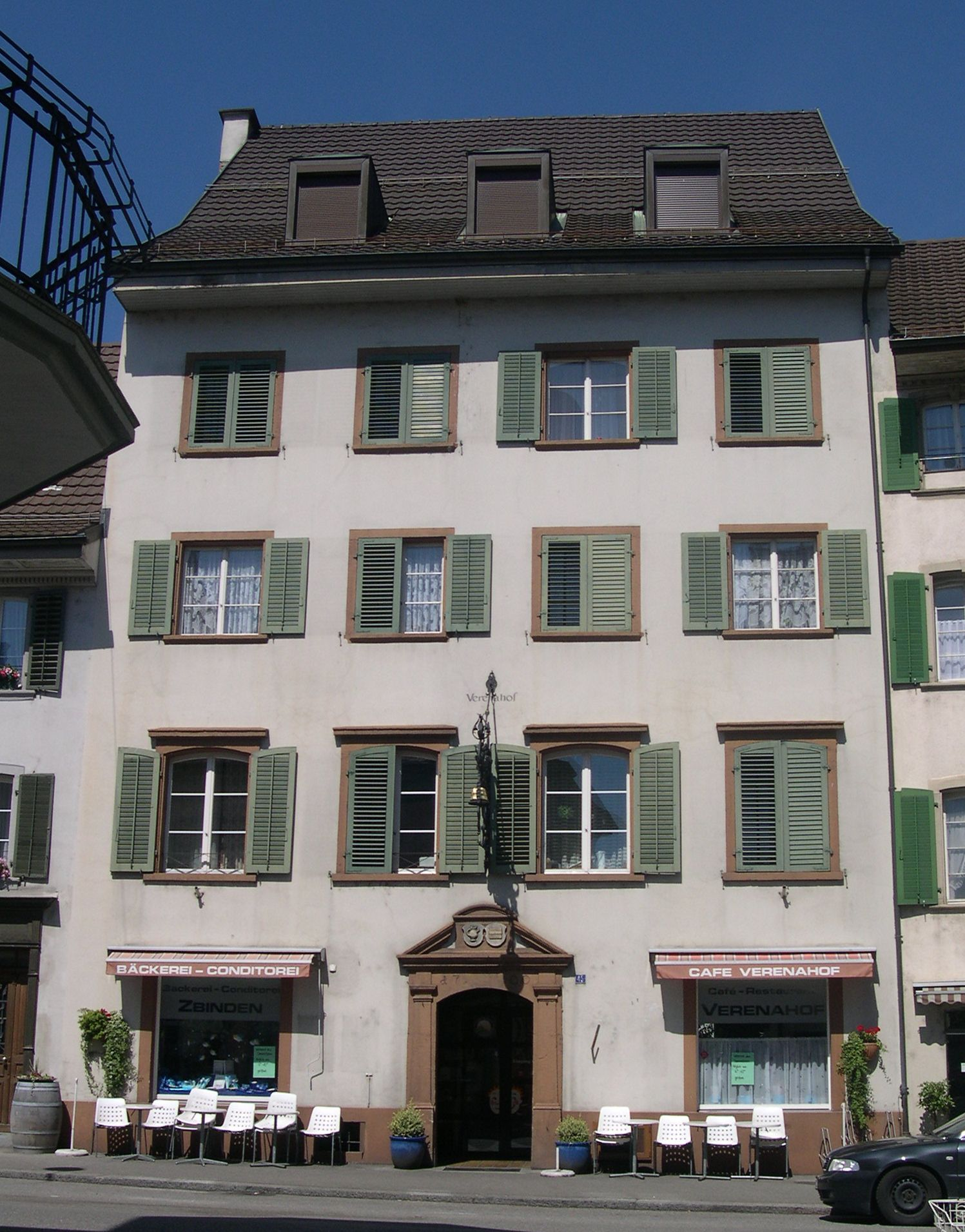 Verenahof, ehemaliges Kapitelhaus im Stiftsbezirk in Zurzach